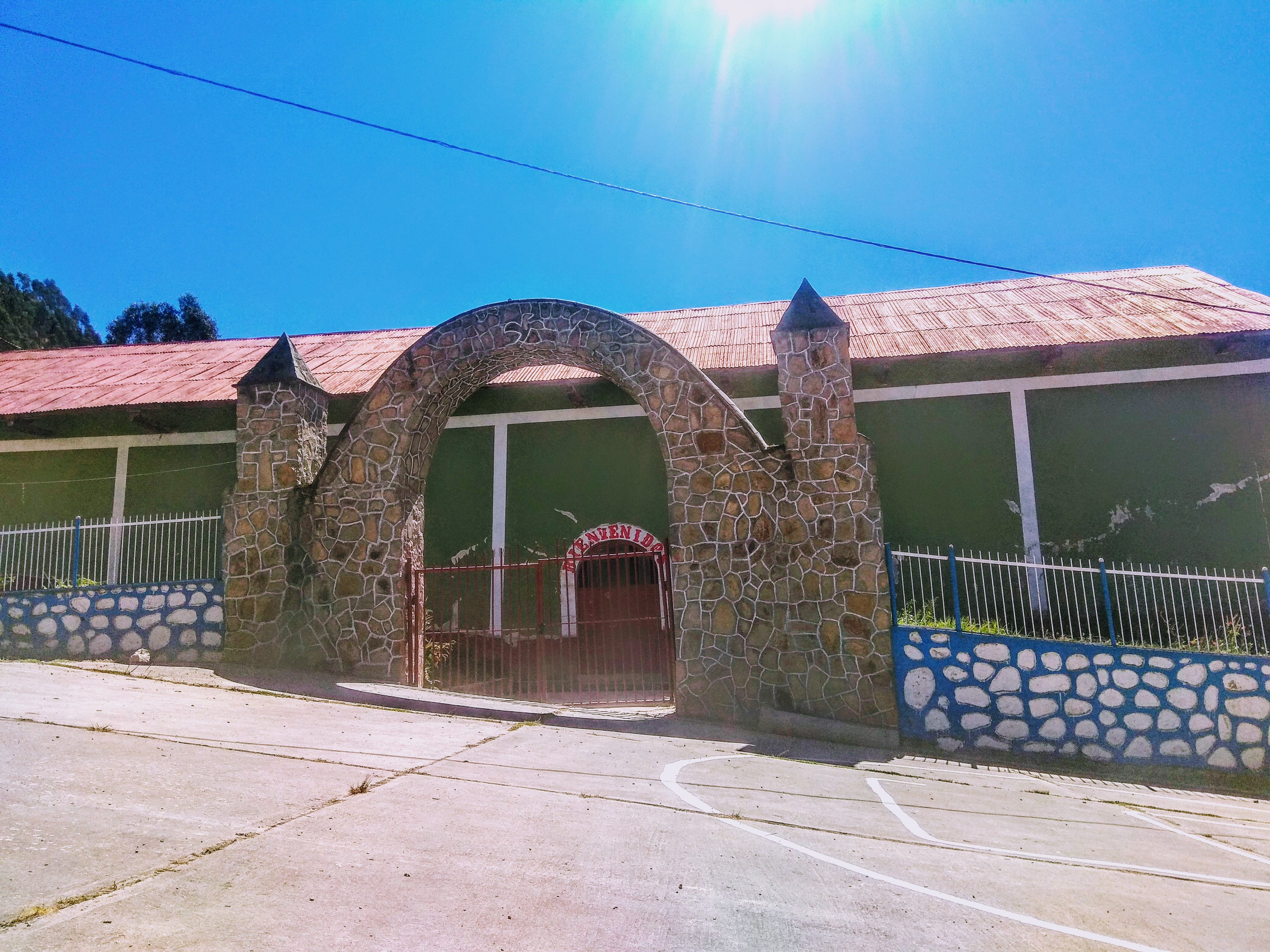 Iglesia de Vilcabamba de época colonial.